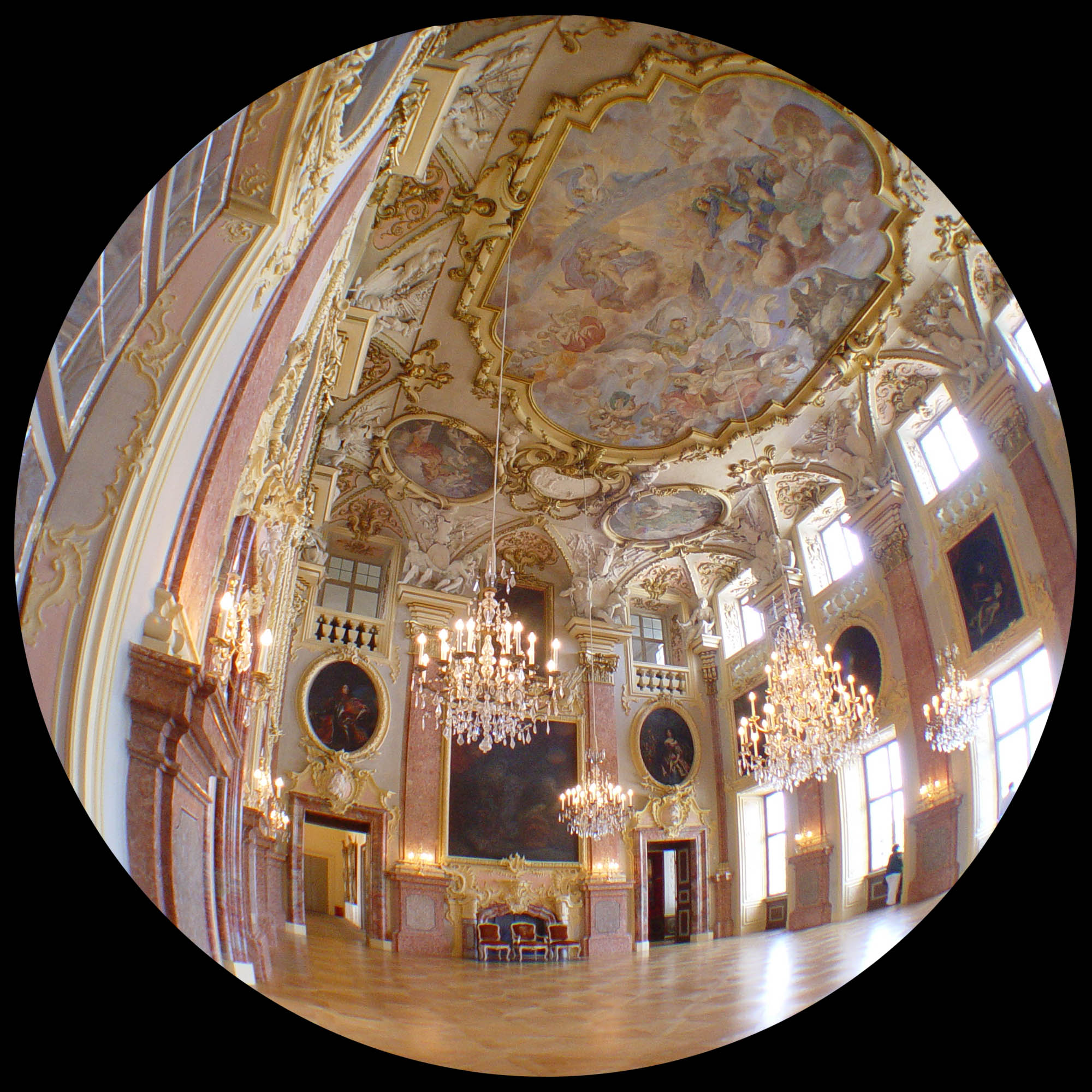 Schloss Rastatt, Prunksaal.Das Schloss wurde vom Markgrafen Ludwig Wilhelm von Baden-Baden erbaut. Das Bild wurde von Benutzer ArtMechanic bearbeitet.